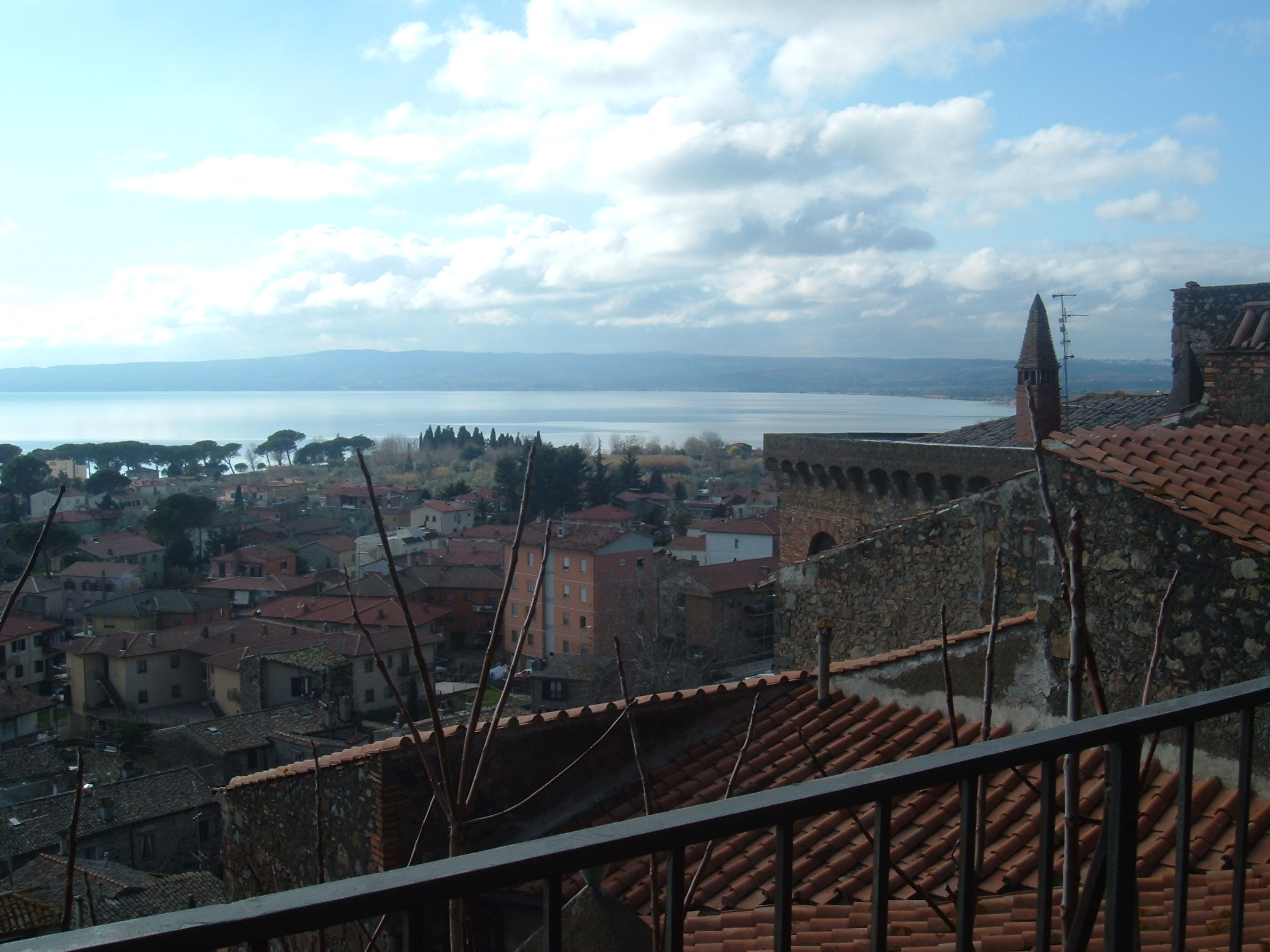 אגם בולסנה, נוף מטירת בולסנה